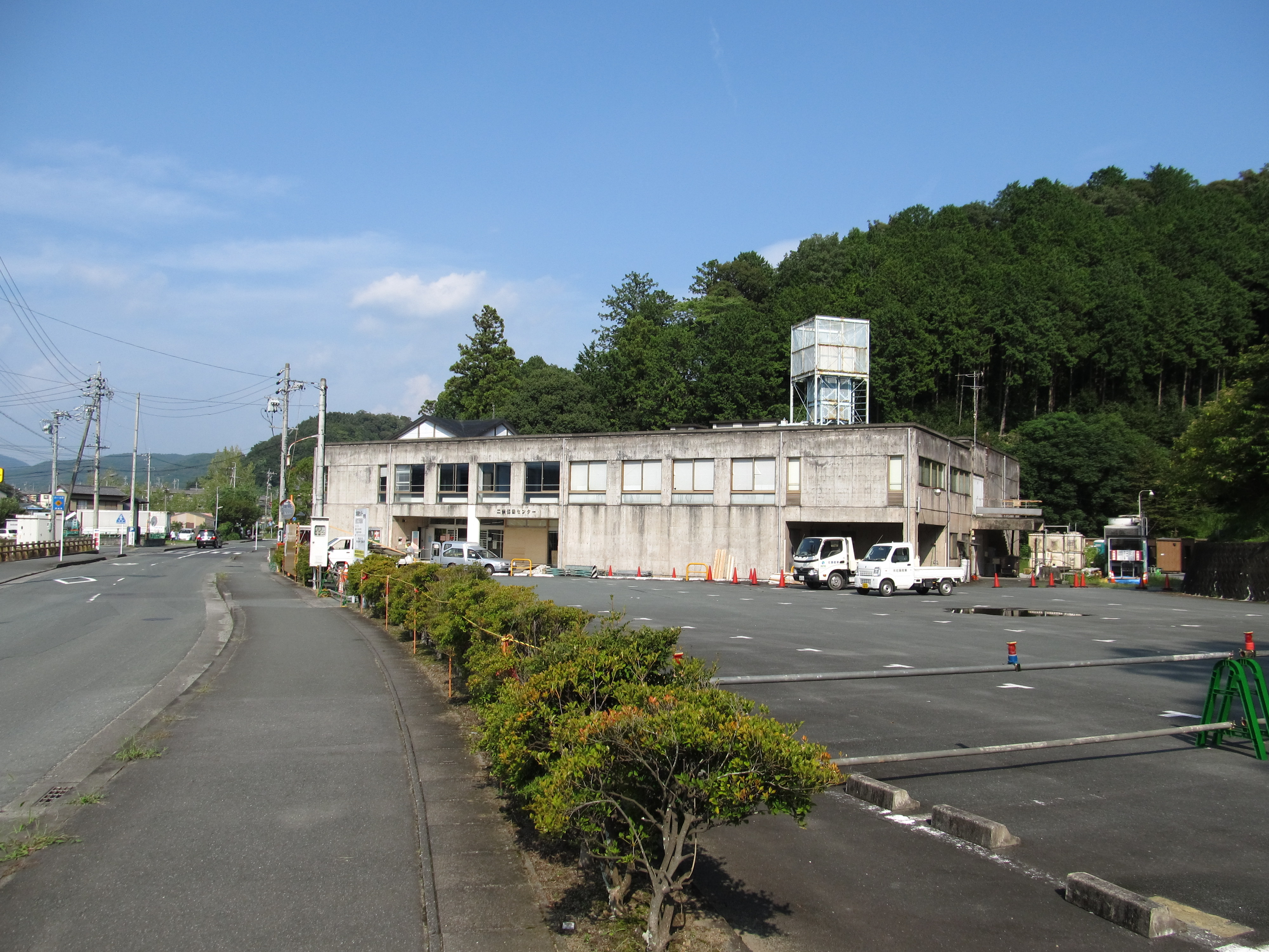 静岡県浜松市天竜区二俣町にある二俣協働センター。 かつて、この場所に光明電気鉄道の終着駅・二俣町駅があった。